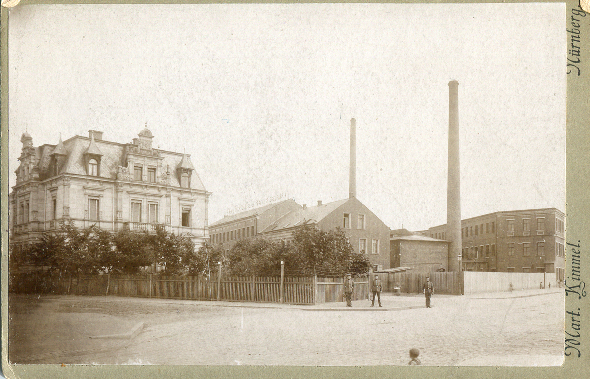 Foto der Firma N. Wiederer von der Bahn aus